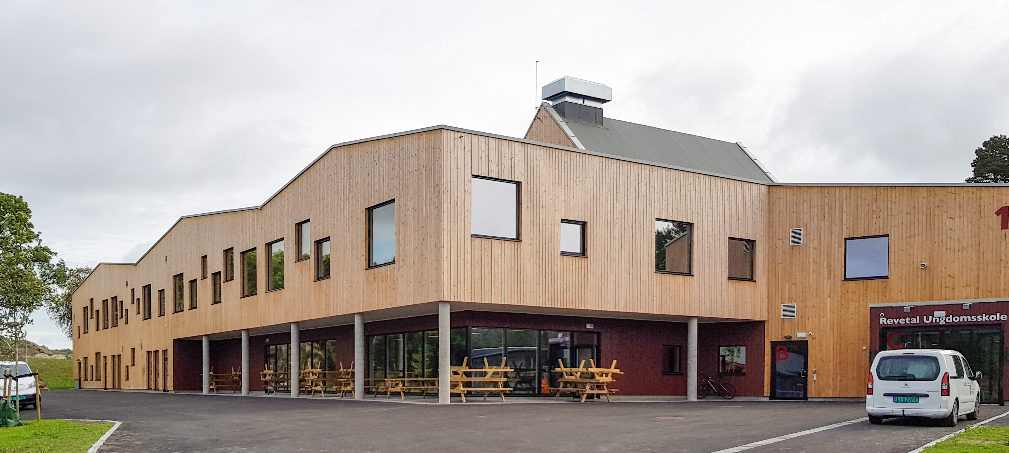 Revetal ungdomsskole